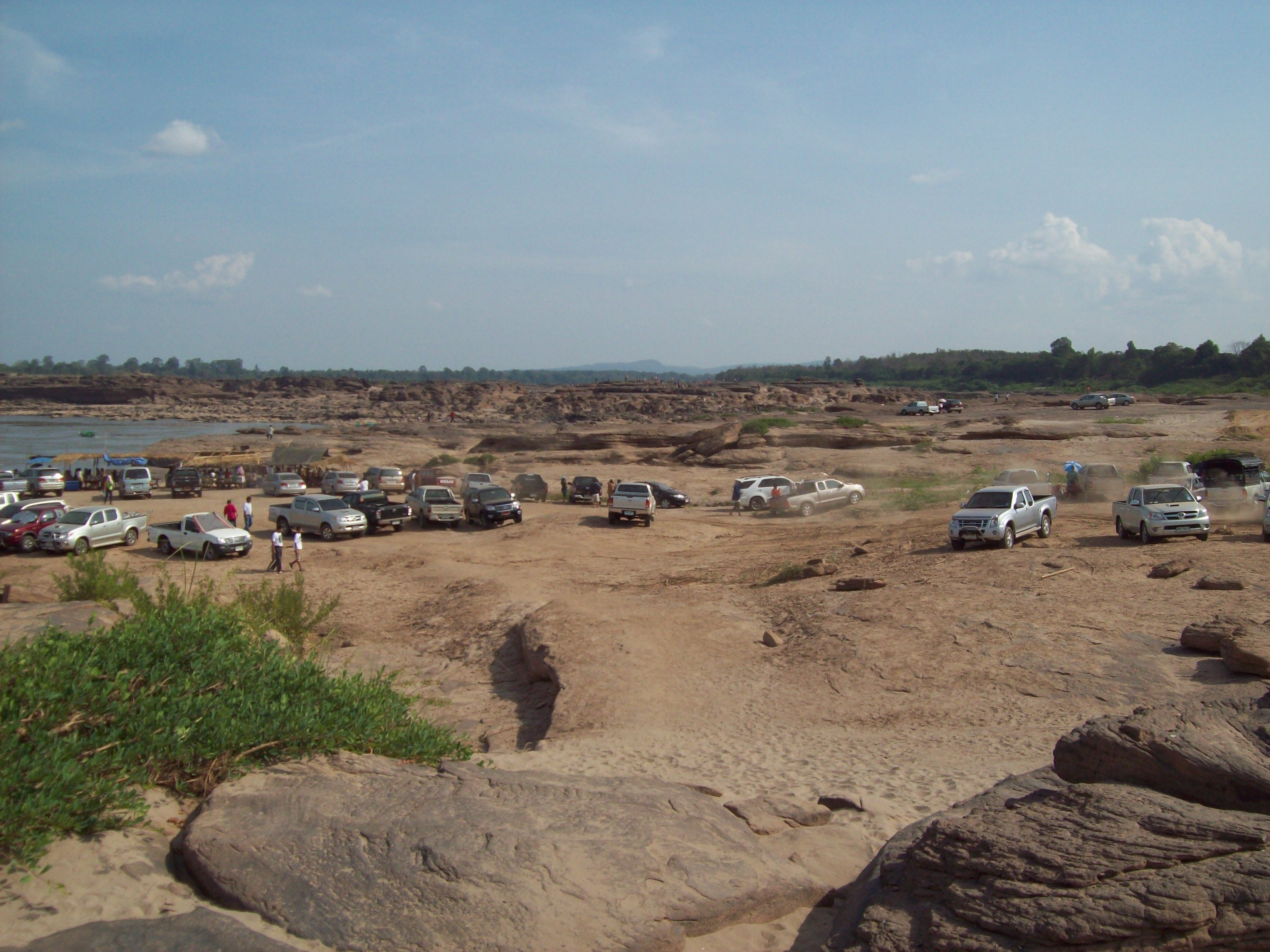 sam phan bok